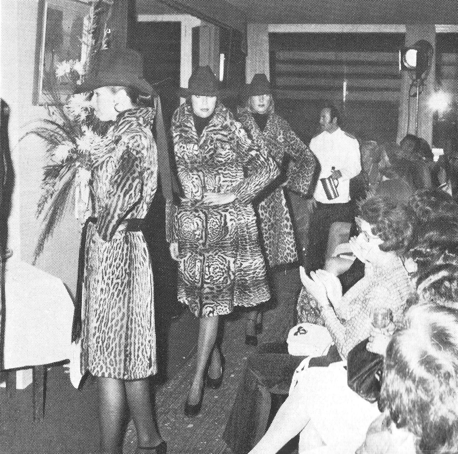 Hans-Joachim & Katrin Lachmann, Wiesbaden, Pelz-Modenschau im Hotel „Schwarzer Bock“ 1972. Ozelotmäntel.